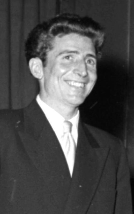 Hermann Buhl bei einem Vortrag im Wiener Konzerthaus nach der Nanga-Parbat–Expedition.